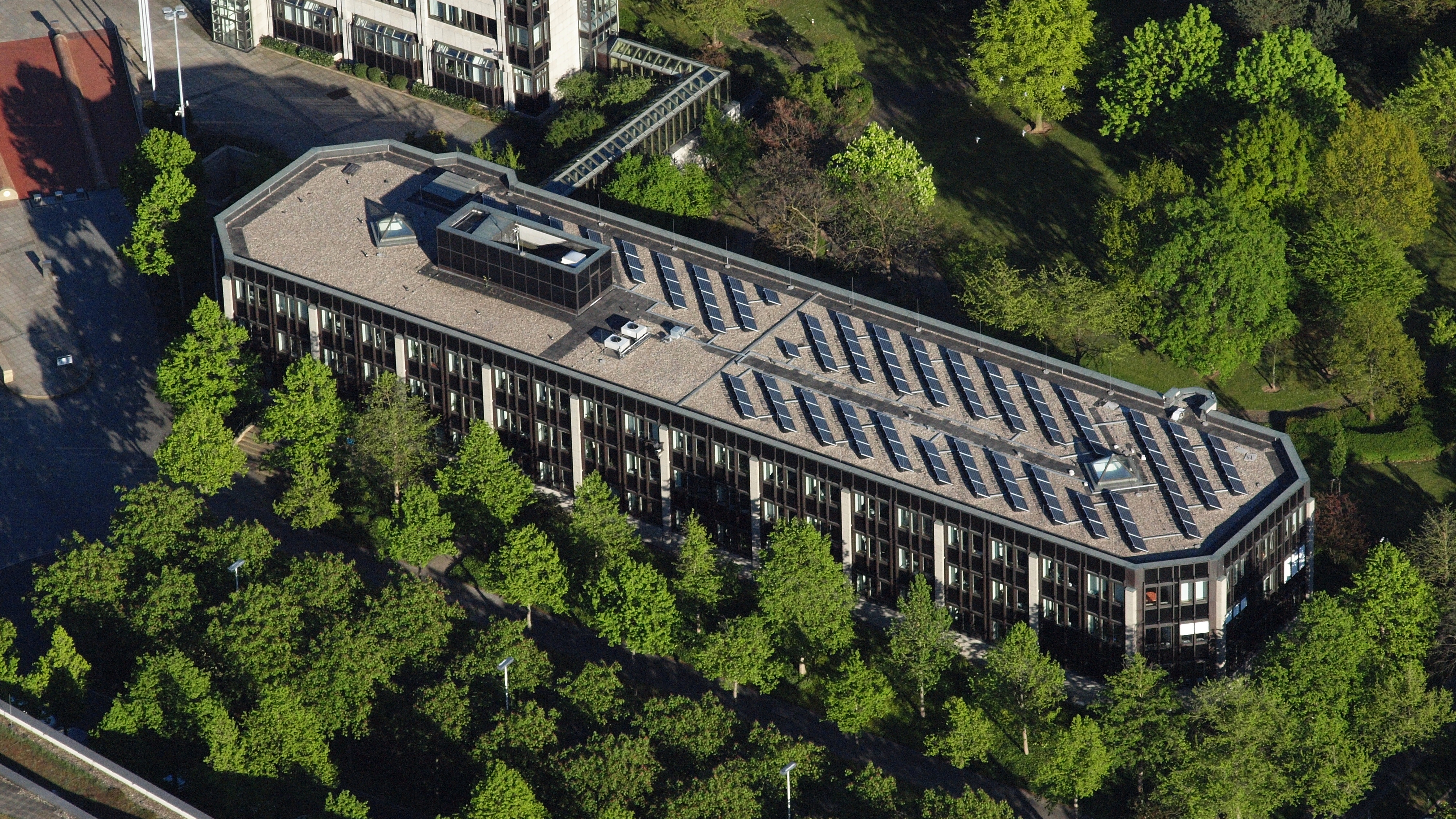 Bundeseisenbahnvermögen, Kurt-Georg-Kiesinger-Allee 2, Bonn-Hochkreuz: Luftaufnahme